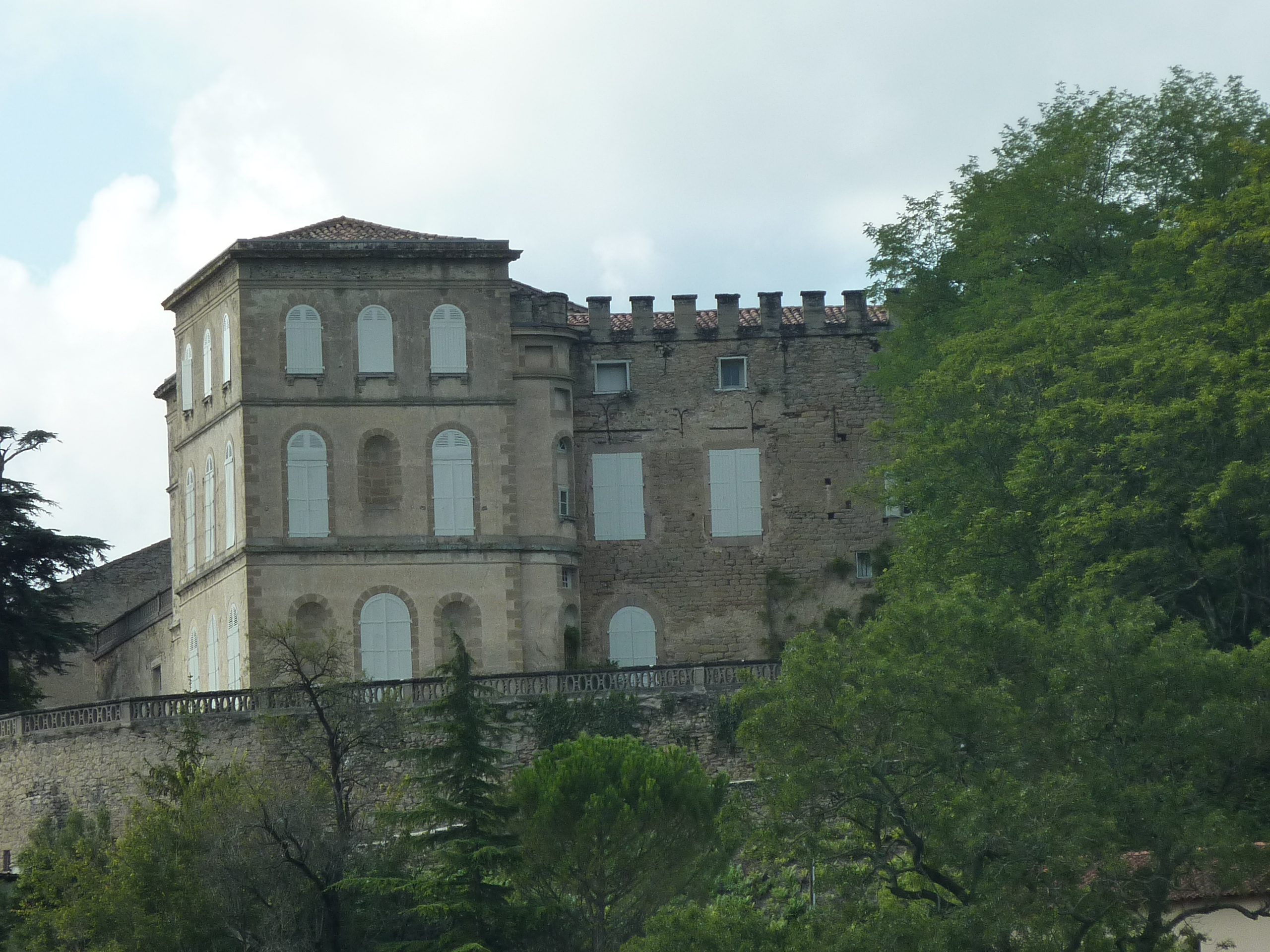 Le château de Viviers-lès-Montagnes est toujours occupé par la famille de Martin de Viviés depuis le milieu du XVIe siècle. Ancienne place forte, la famille de Martin de Viviés décida d'y percer des fenêtres, d'abattre des murs, et de modifier certaines sections afin d'y vivre.